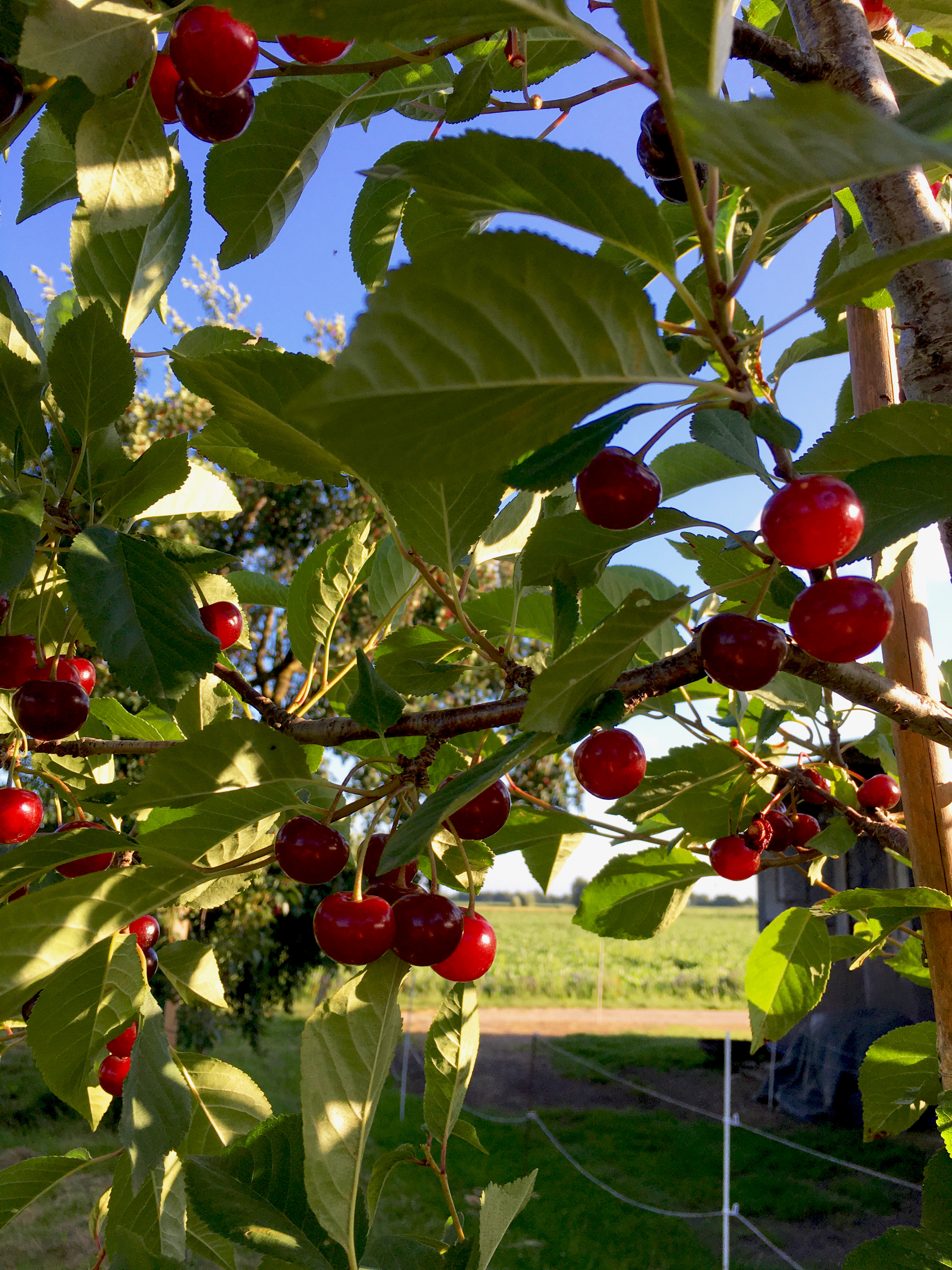 Schwäbische Weinweichseln an einem jungen Baum kurz vor der Vollreife. Standort: Bächingen